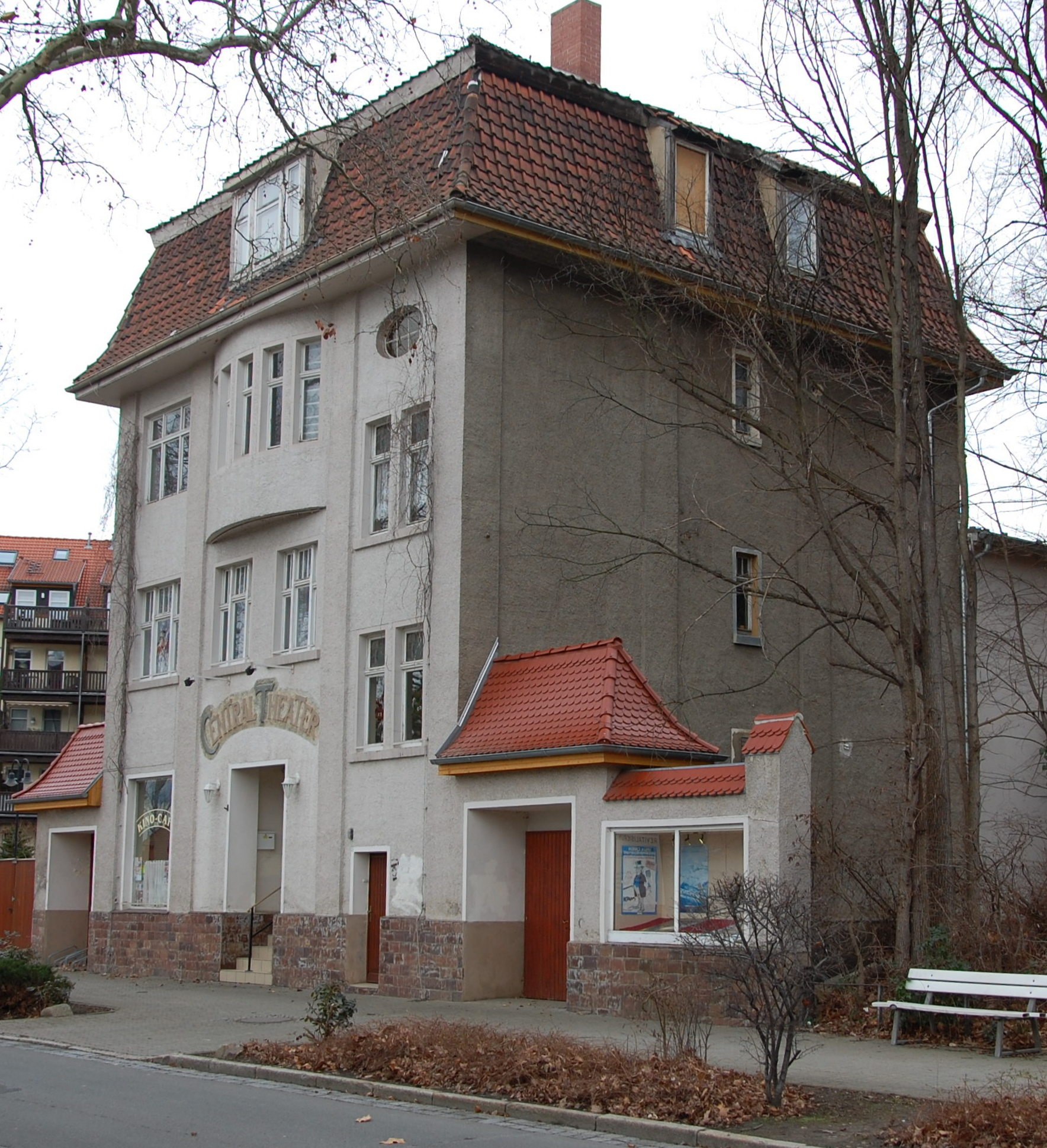 Haus Bahnhofstraße 5 in Thale